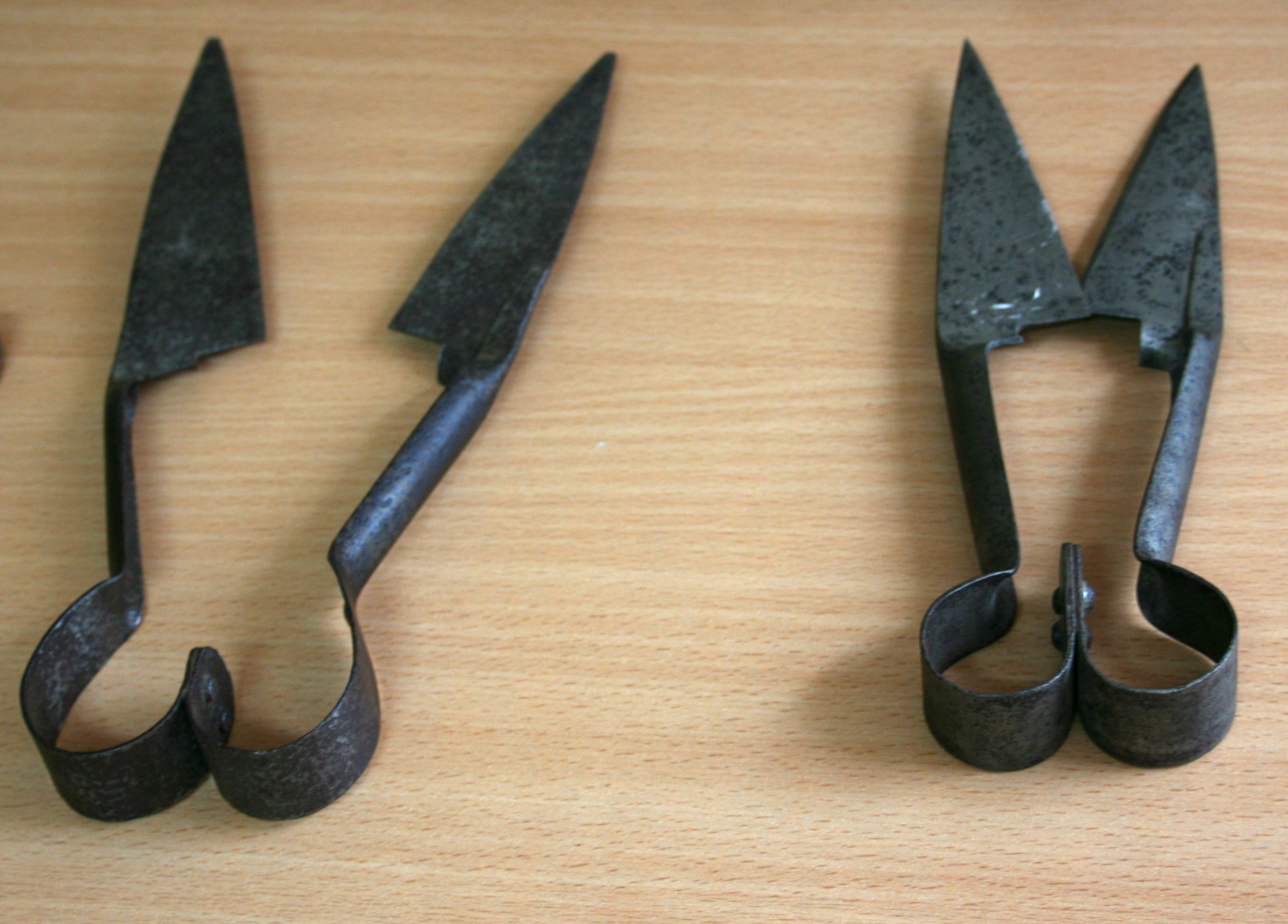 Nożyczki, ekspozycja muzealna w GOK w Sierakowicach, woj. pomorskie